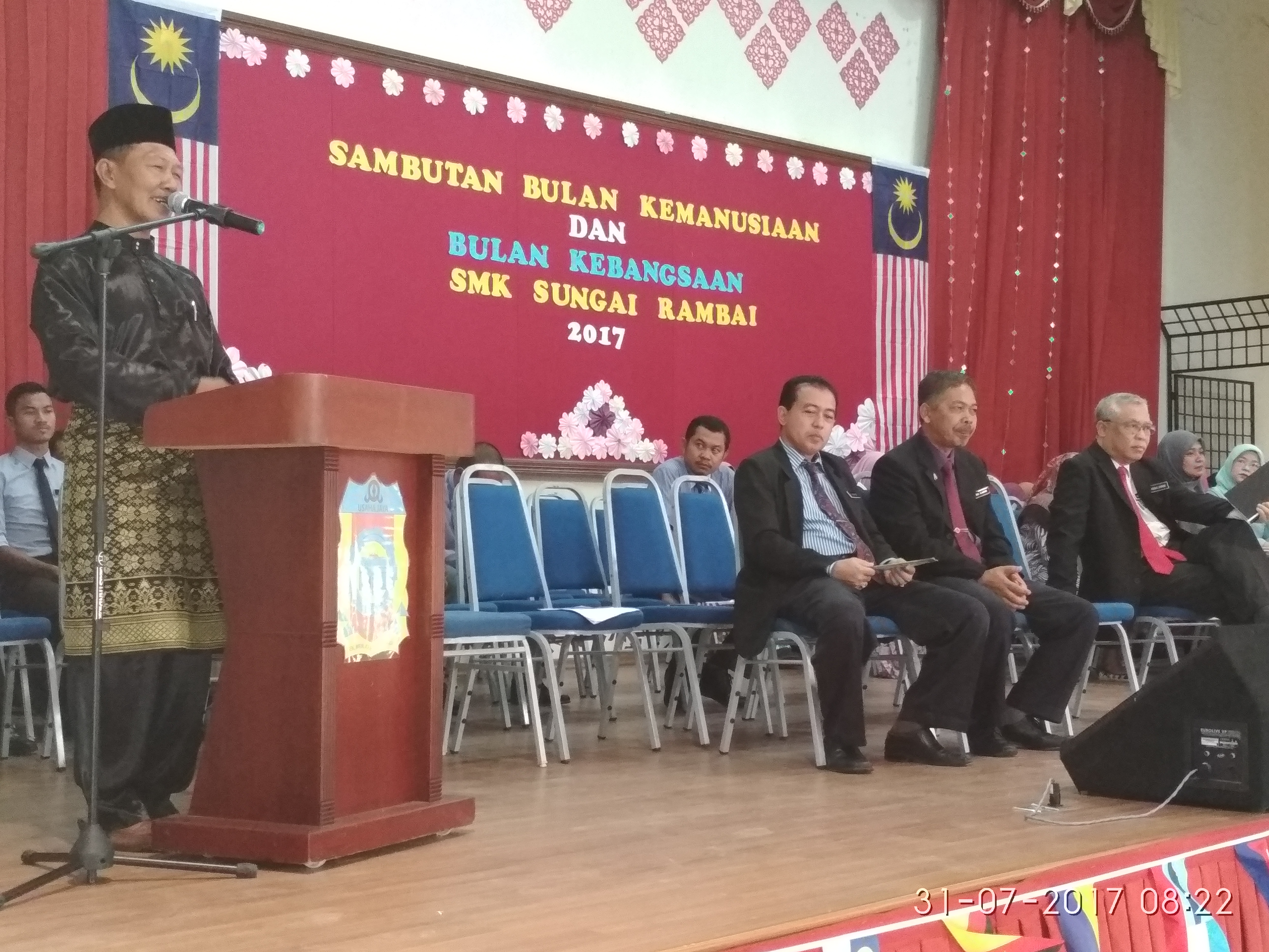 ucapan dari tokoh sejarah sksr